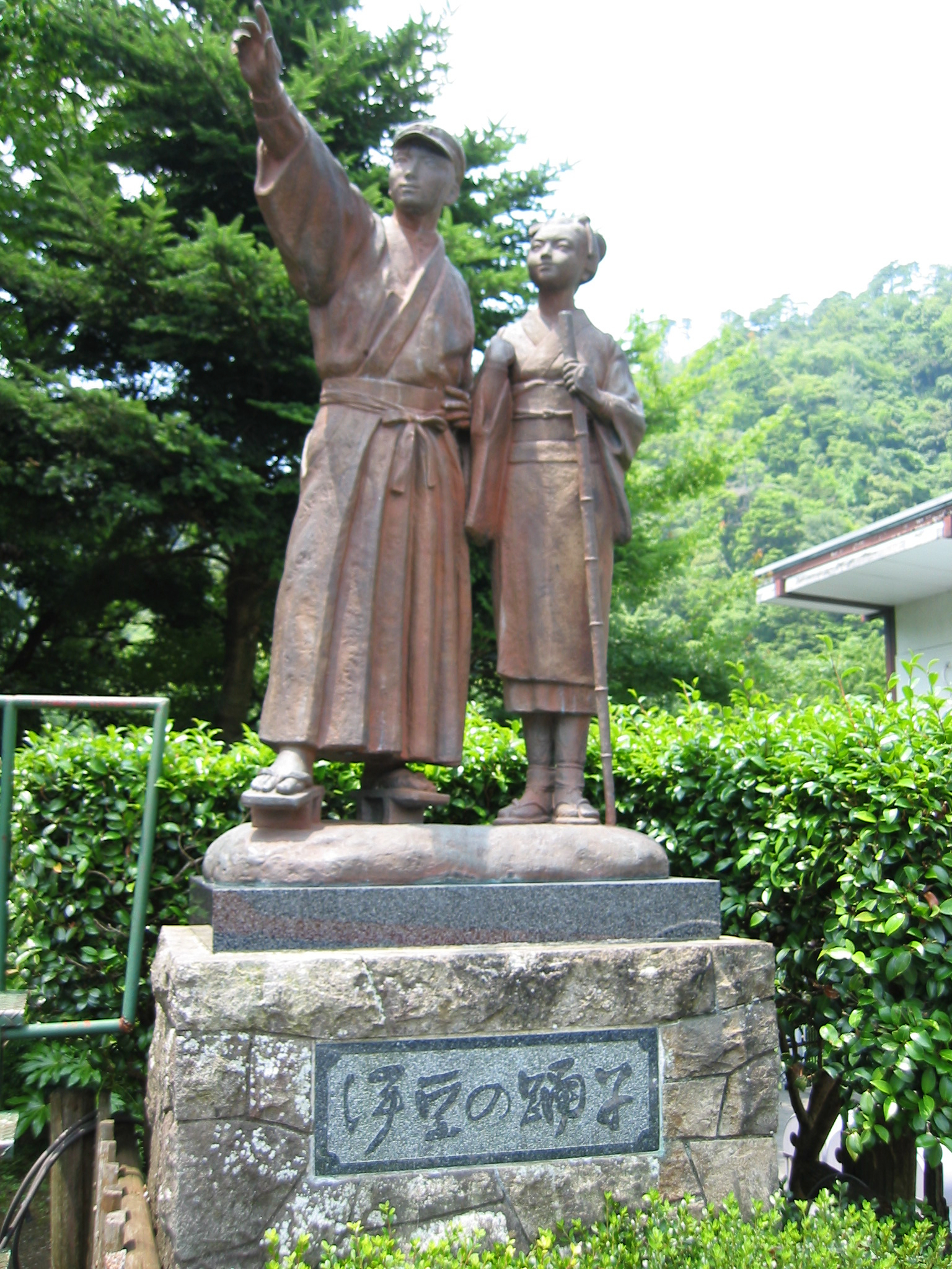 伊豆の踊子の像